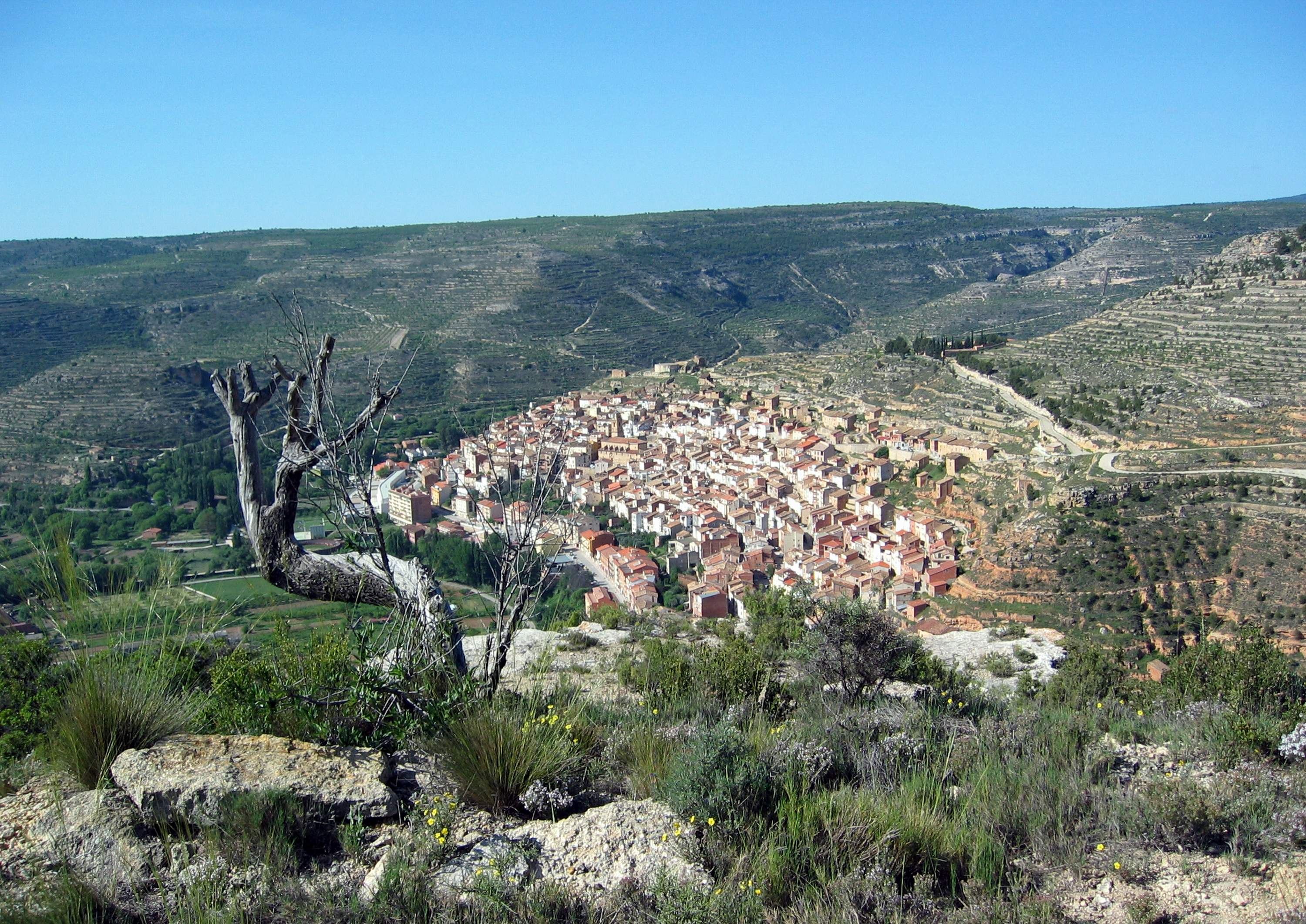 Vista general (nororiental) de Ademuz (Valencia), desde el Pico Castro.